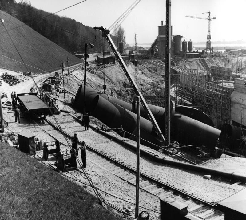 Pumpspeicherwerk Geesthacht Die ersten beiden Hosenrohre (so wird dieser Abschnitt der Rohrbahn von den Technikern wegen der Zweiteilung zu Pumpenanlage und Turbine anschaulich genannt) werden bereits montiert. Im Hintergrund der sogenannte IBAG-Turm, die erste elektronisch gesteuerte Betonmischanlage Europas.